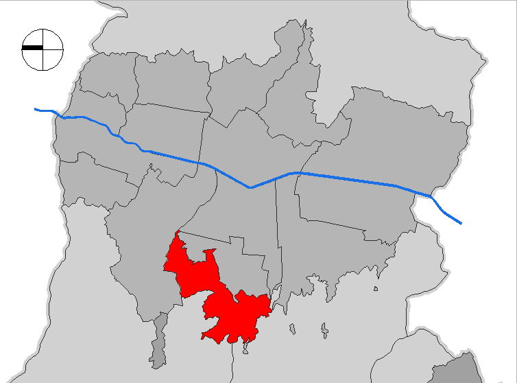 mapa de la comuna San Javier. Medellín, Colombia.